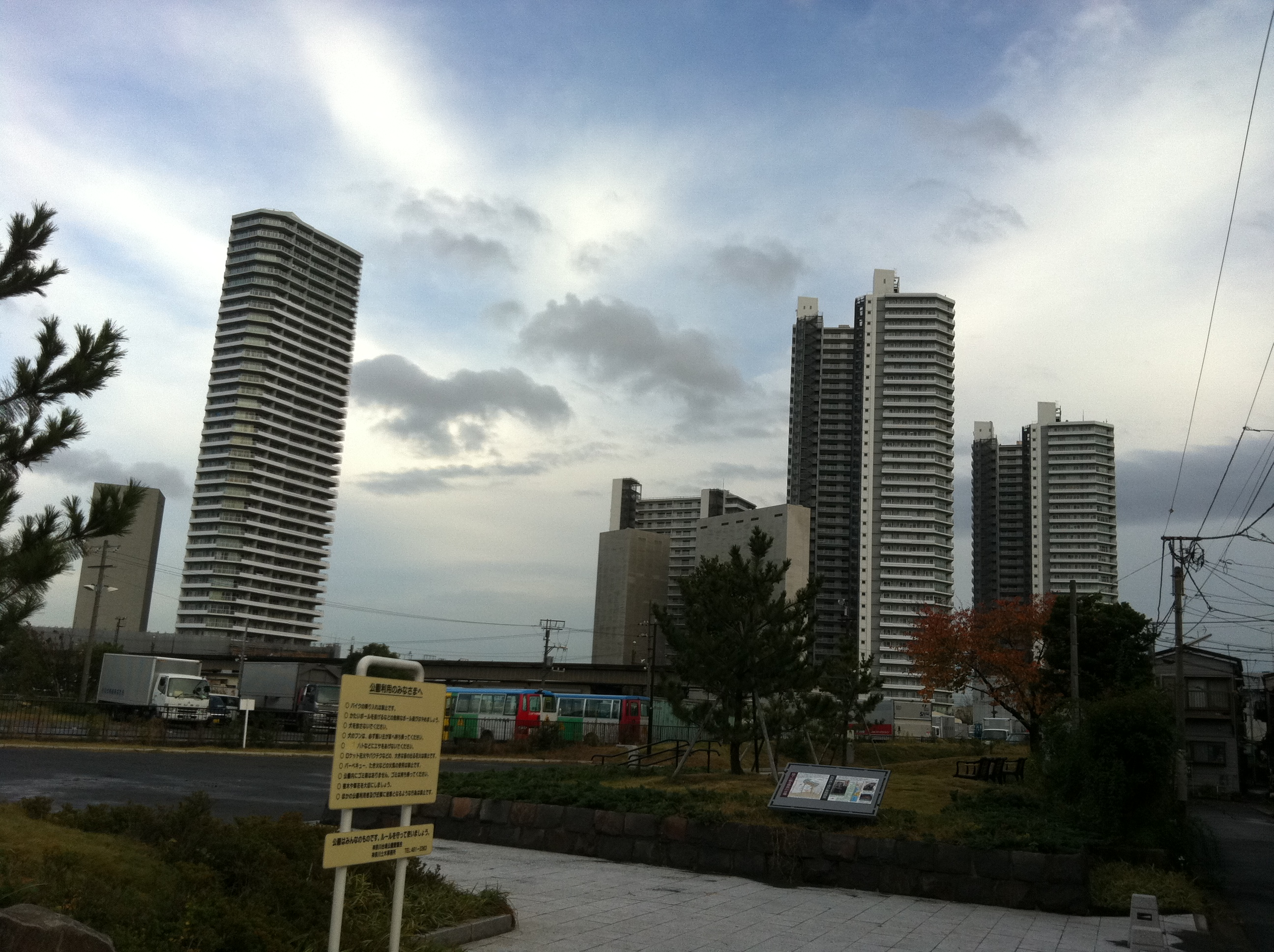 コットンハーバー地区のマンション群、台場公園より。